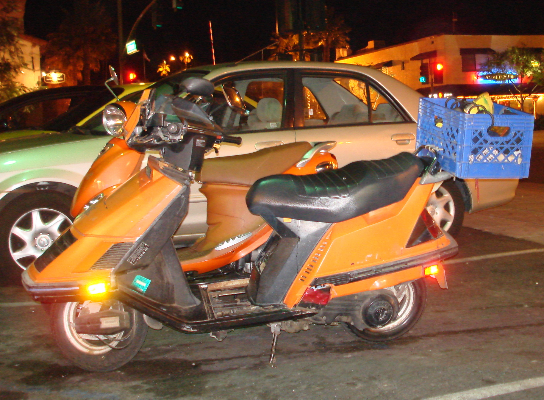 Honda Elite CH125?